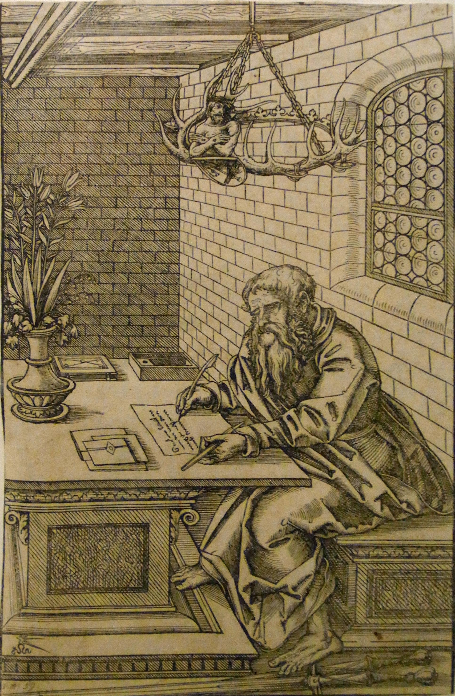 Stiftung Schloss Friedenstein, Gotha, Schlossmuseum - Aus den Sammlungen der Herzog von Sachsen-Coburg und Gota'schen Stiftung für Kunst und Wissenschaft